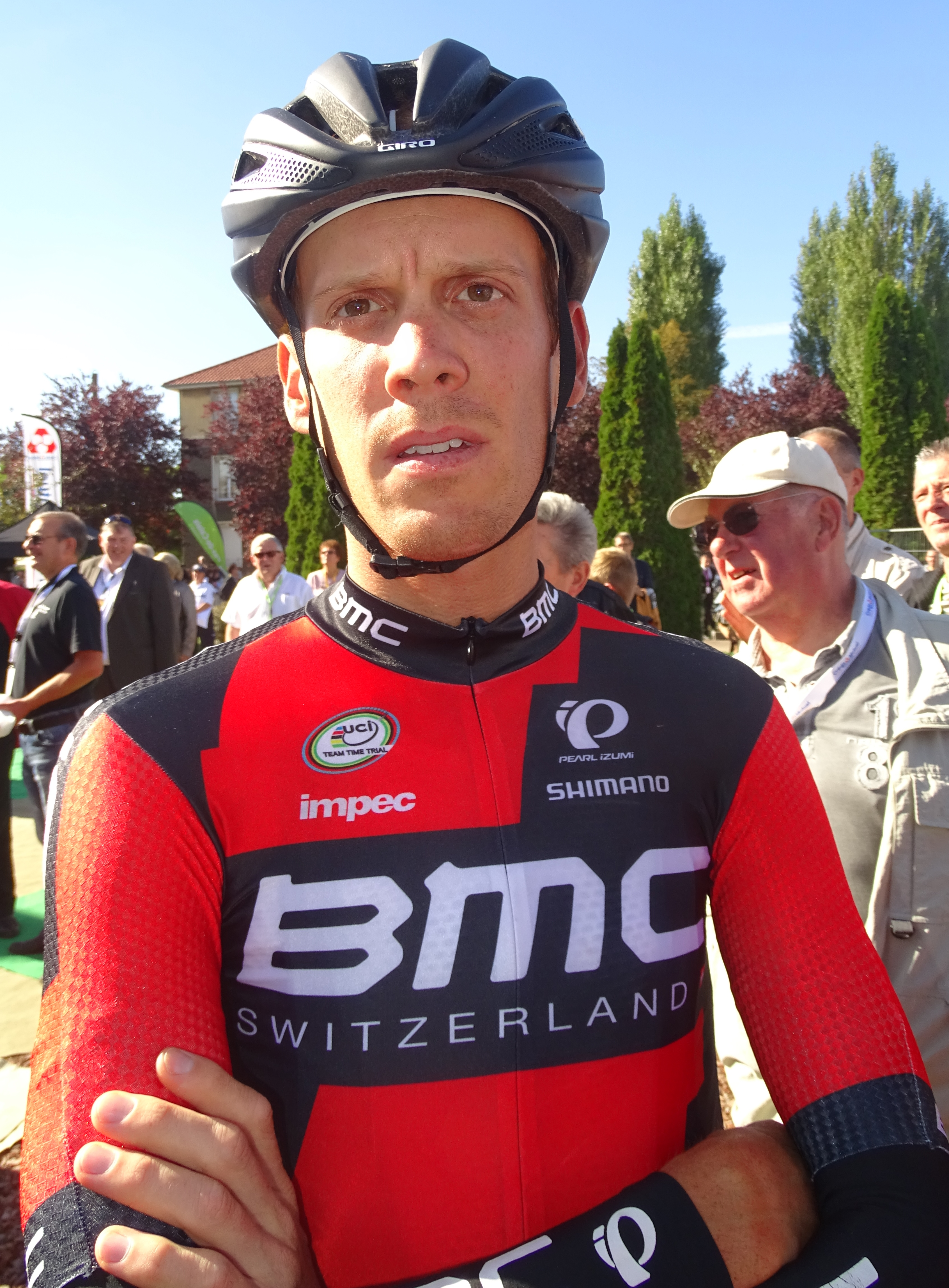 Reportage réalisé le dimanche 20 septembre à l'occasion du départ et de l'arrivée du Grand Prix d'Isbergues 2015 à Isbergues, Nord-Pas-de-Calais, France.